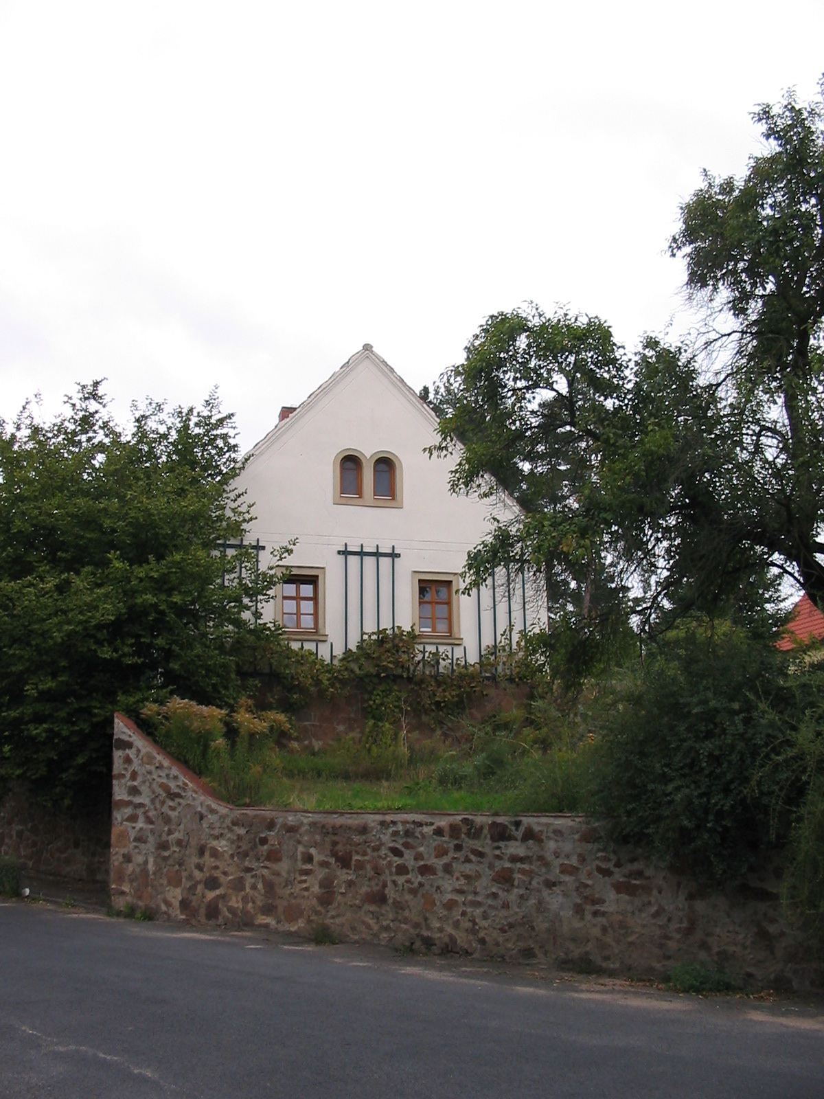 Wohnhaus Ringstraße 16 (Radebeul), Radebeul